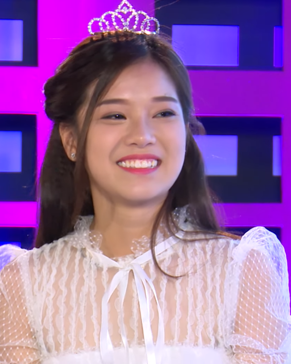 Hoàng Yến Chibi, ảnh chụp màn hình từ video của Gương Mặt Thân Quen Official (screen capture from video of Gương Mặt Thân Quen Official).